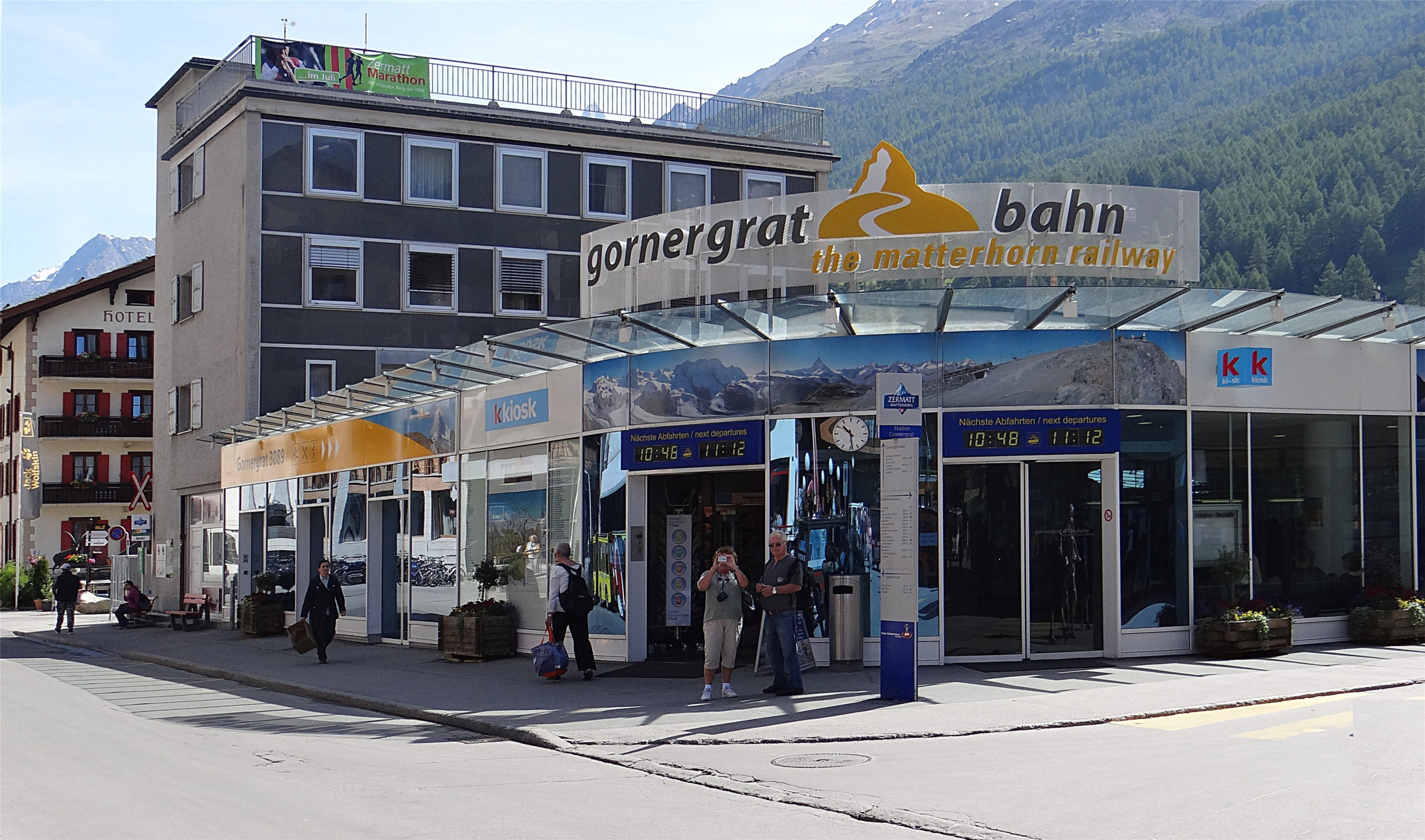 Entrée de la gare ferroviaire du Gornergrat Bahn, Zermatt, canton du Valais, Suisse.